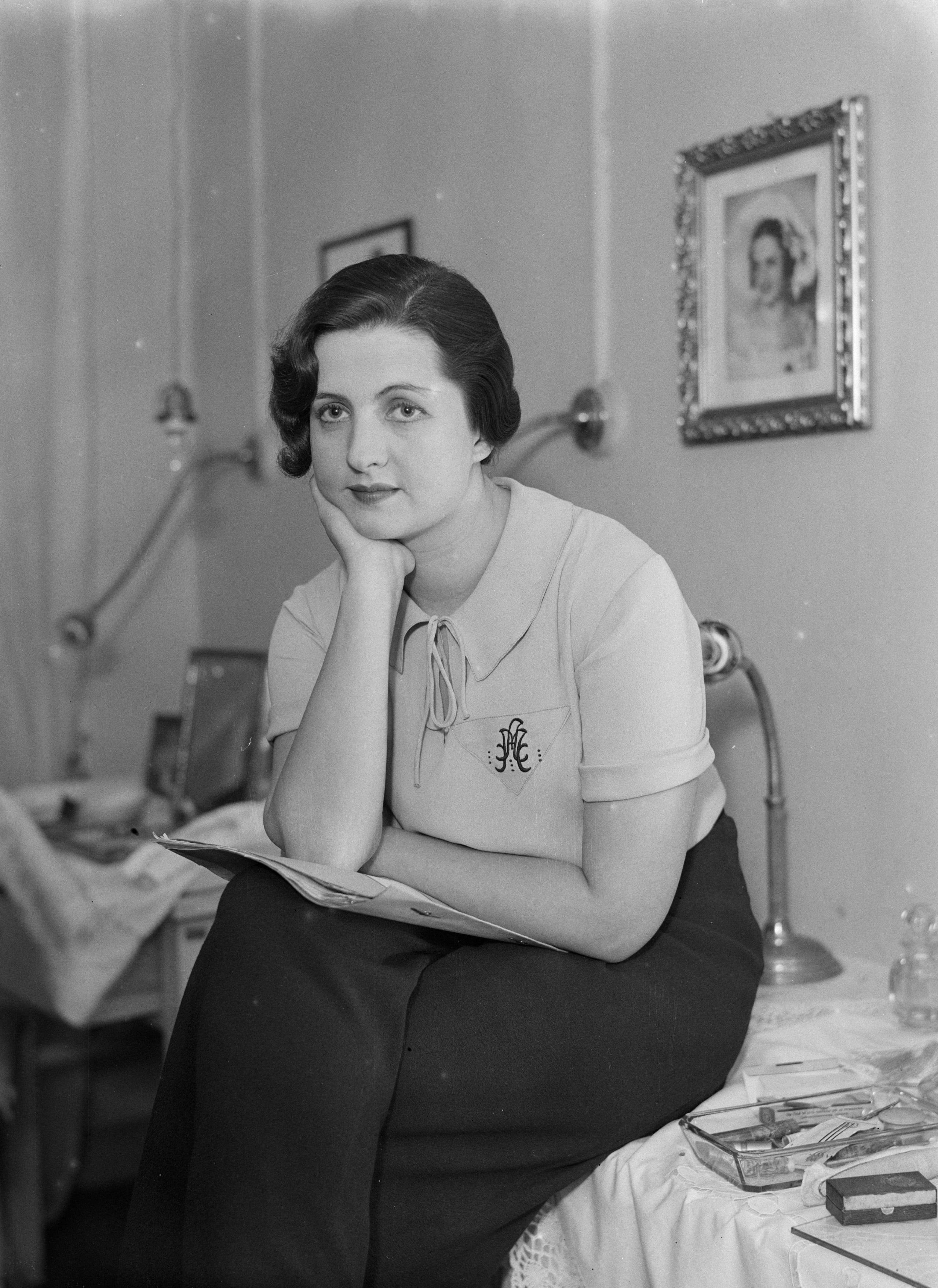 Collectie / Archief : Fotocollectie Van de Poll Reportage / Serie : Reis naar Polen Beschrijving : Portret van de Poolse actrice Jadwiga Smosarska die zit op de tafel van haar kleedkamer in Teatr Polski Annotatie : Jadwiga Smosarska (1898 –1971) kreeg o.a. bekendheid door haar optreden als actrice in Poolse films tijdens het interbellum Datum : 1934 Locatie : Polen, Warschau Trefwoorden : acteurs, portretten, schouwburgen Persoonsnaam : Smosarska, Jadwiga Fotograaf : Poll, Willem van de Auteursrechthebbende : Nationaal Archief Materiaalsoort : Glasnegatief Nummer archiefinventaris : bekijk toegang 2.24.14.02 Bestanddeelnummer : 190-1235